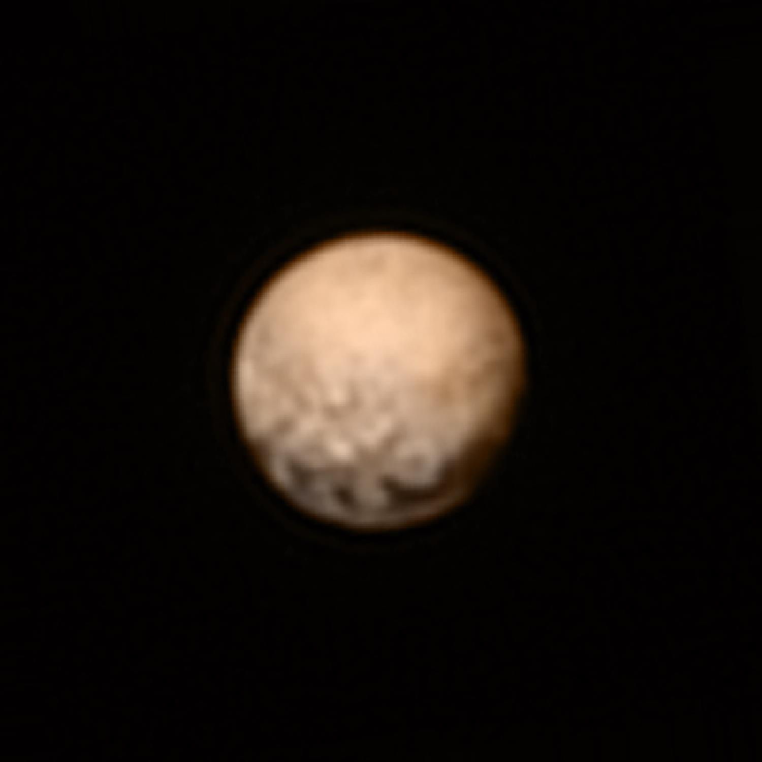 Photographie en couleurs quasi-réelles de la planète Pluton prise par la sonde New Horizons le 3 juillet 2015 à une distance de 12,5 millions de kilomètres.